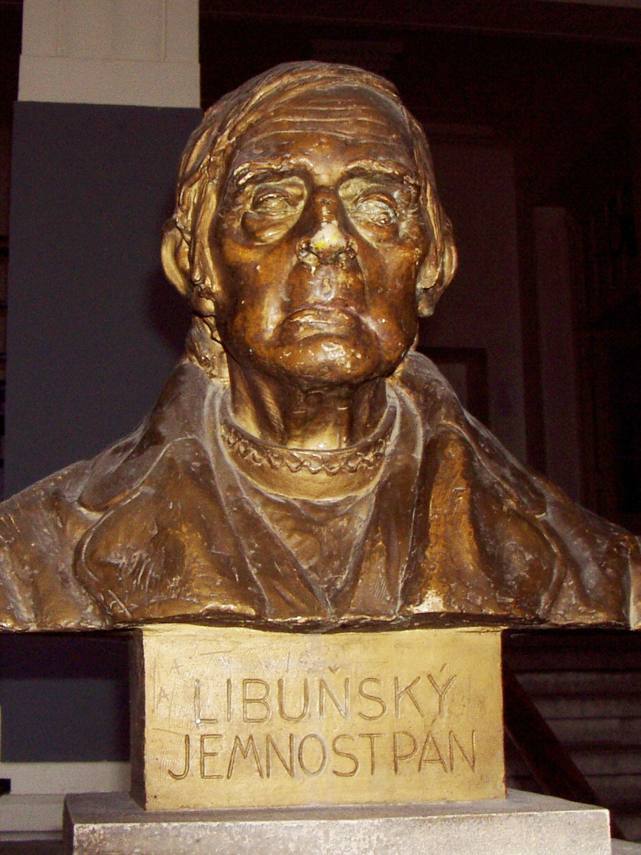 Busta Antonína Marka, libuňského jemnostpána, českého duchovního a překladatele na hlavním schodišti Gymnázia Turnov.